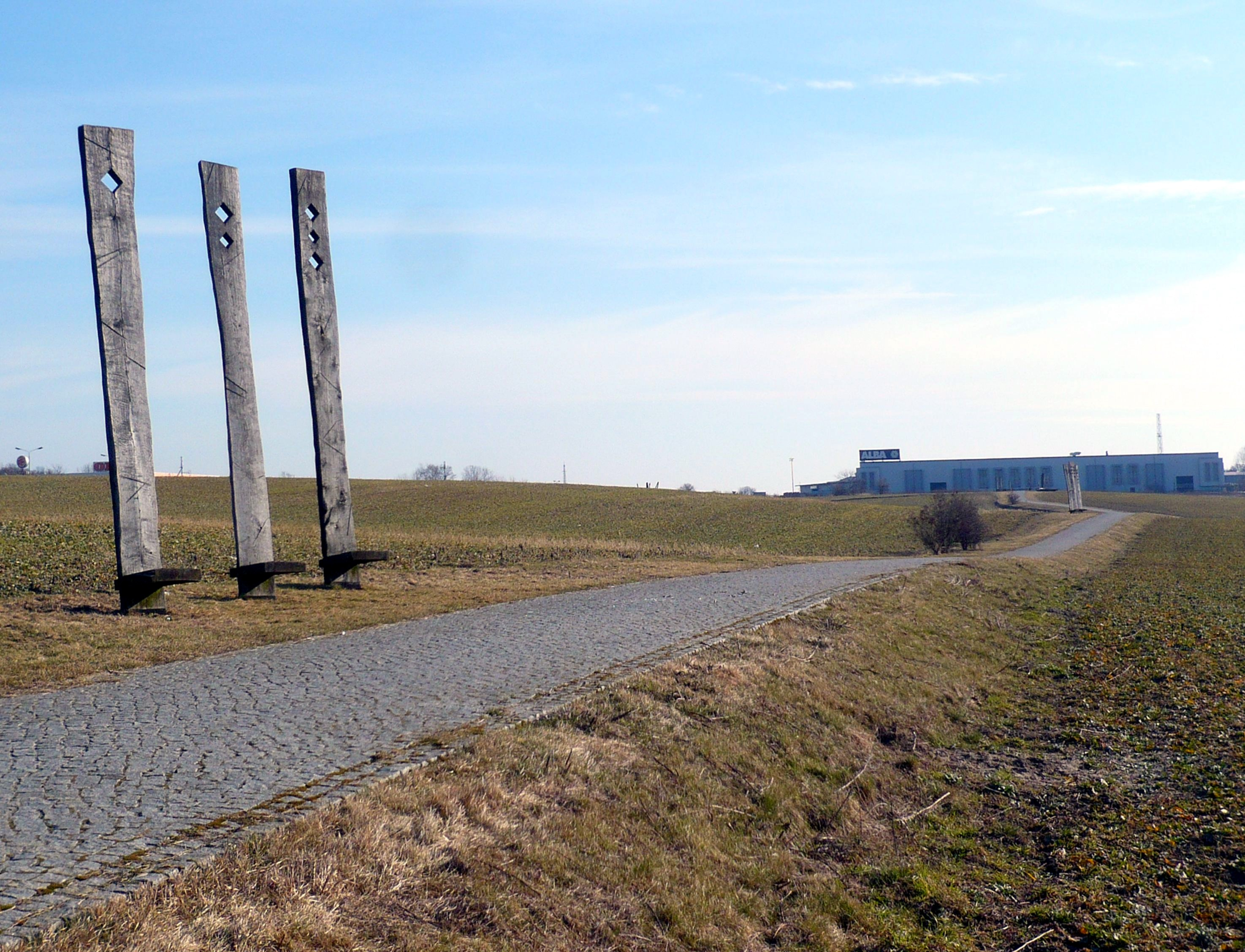 Berlin-Mahlsdorf, "Berliner Balkon" mit Skulpturen Drei Stühle in zweifacher Ausfertigung